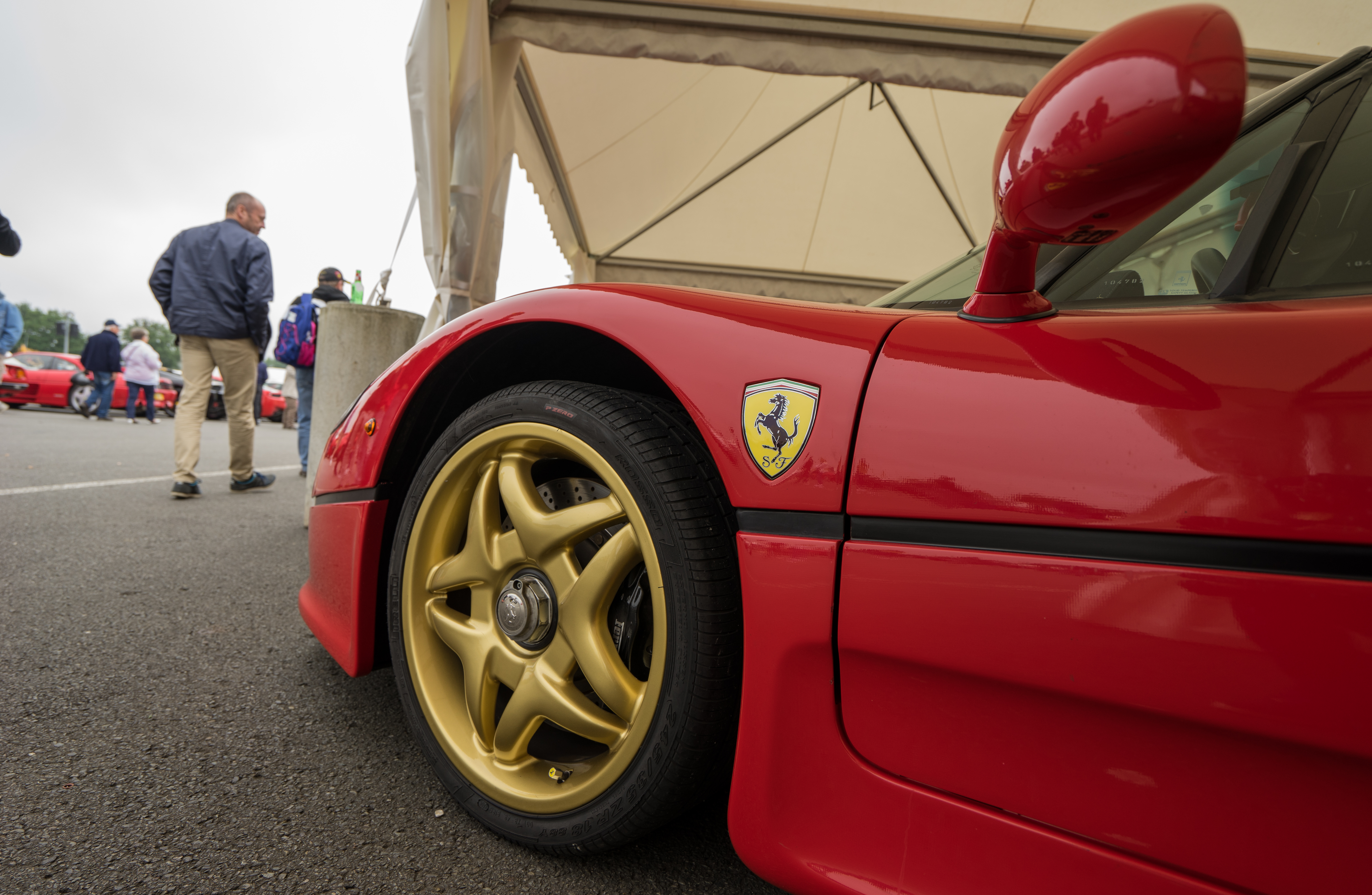 V12 520cv 471N.m 1230kg 0-100 3.6sec 325km/h